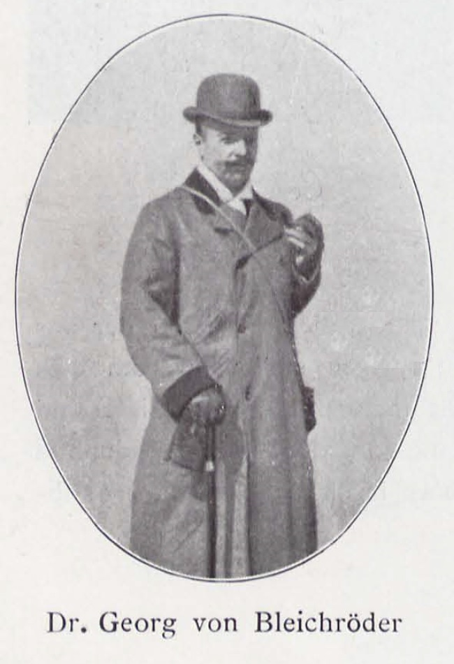 Georg von Bleichröder (1857-1902), Berliner Bankier jüdischer Herkunft.